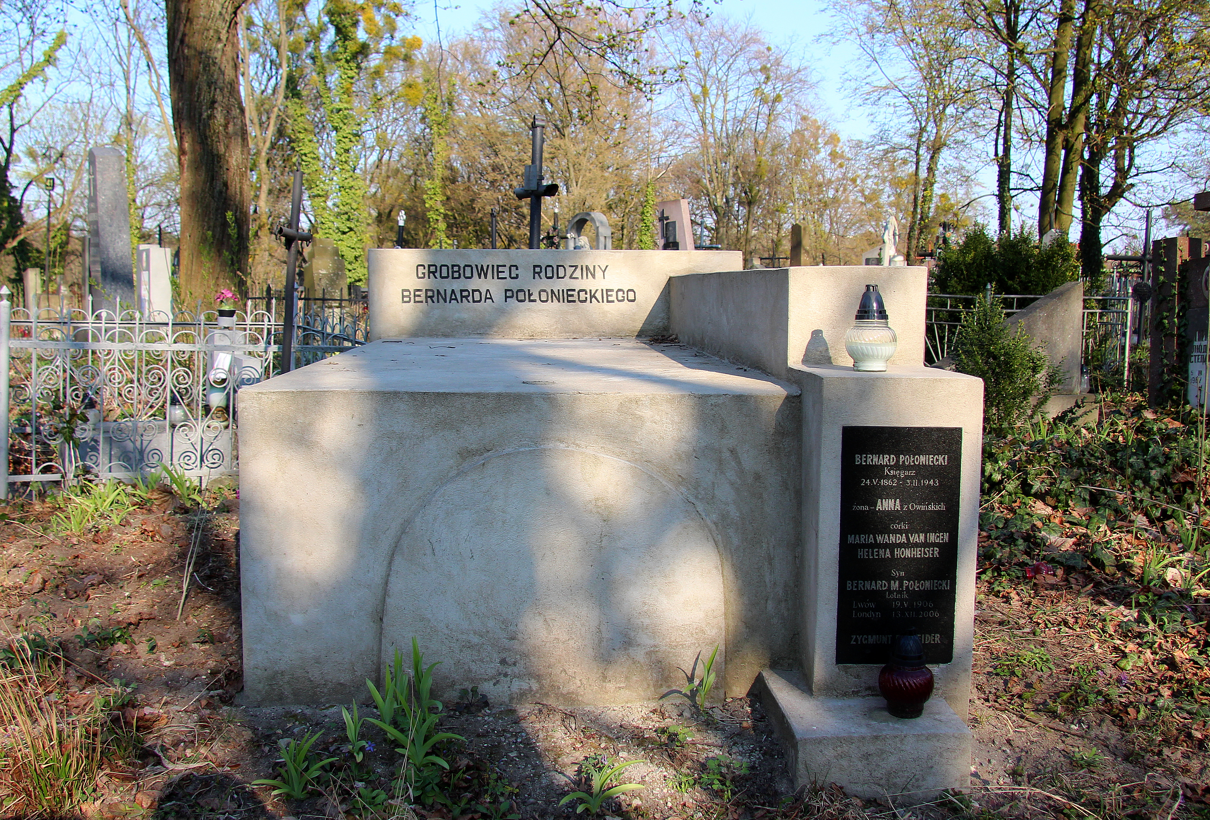 Гробівець родини Полонецьких. Личаківський цвинтар.